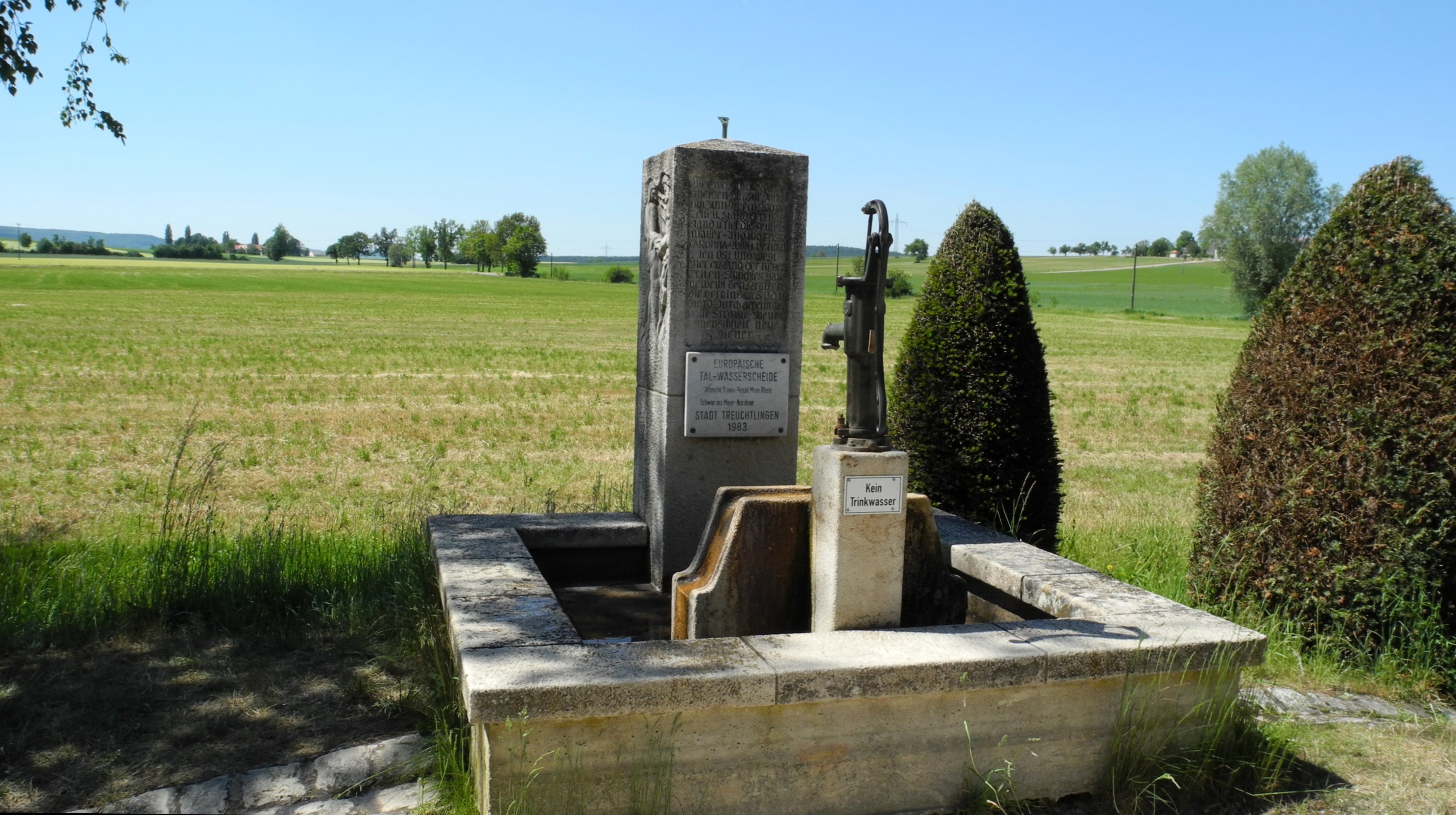 Weißenburg - Europäische Wasserscheide an einem Pump-Brunnen